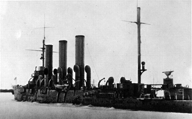 Крейсер "Аврора" в Ораниенбауме, 1944 год